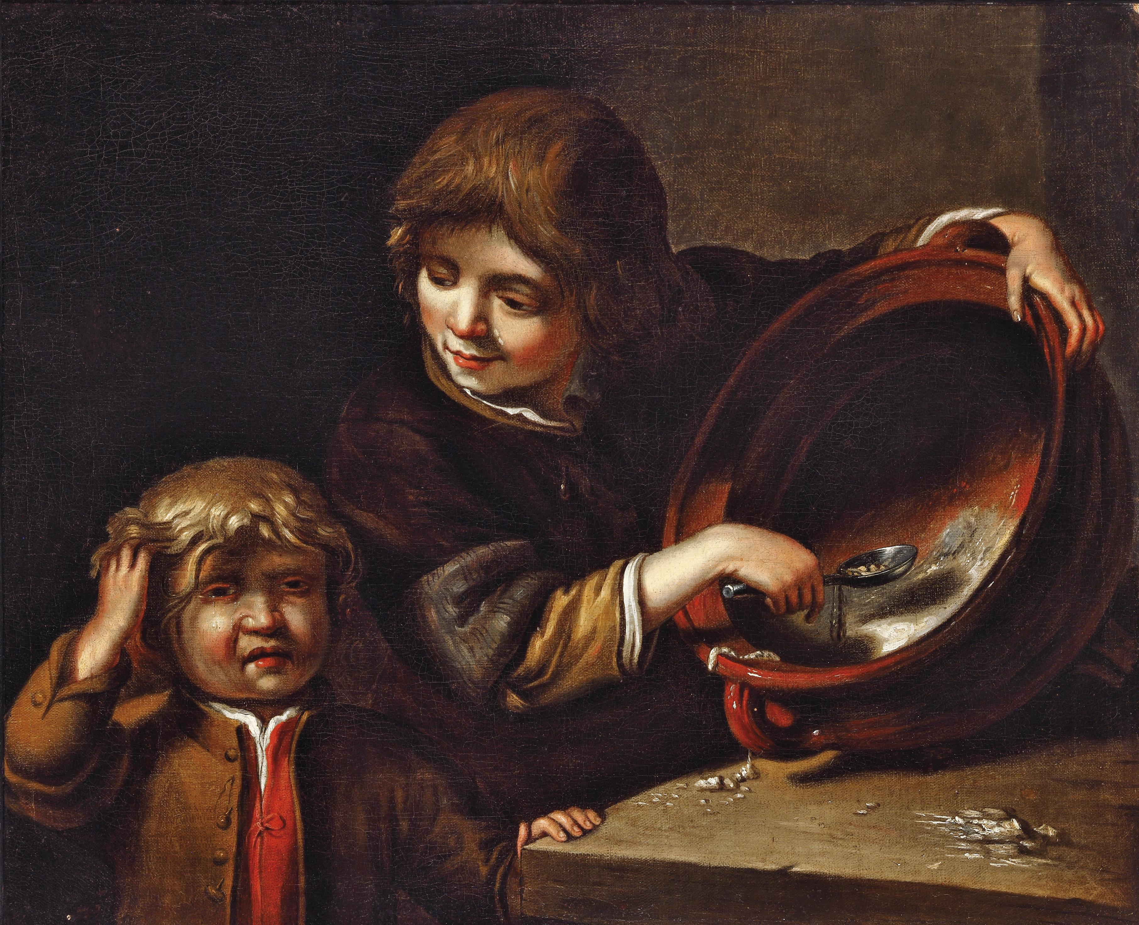 Zwei Kinder bei der Mahlzeit